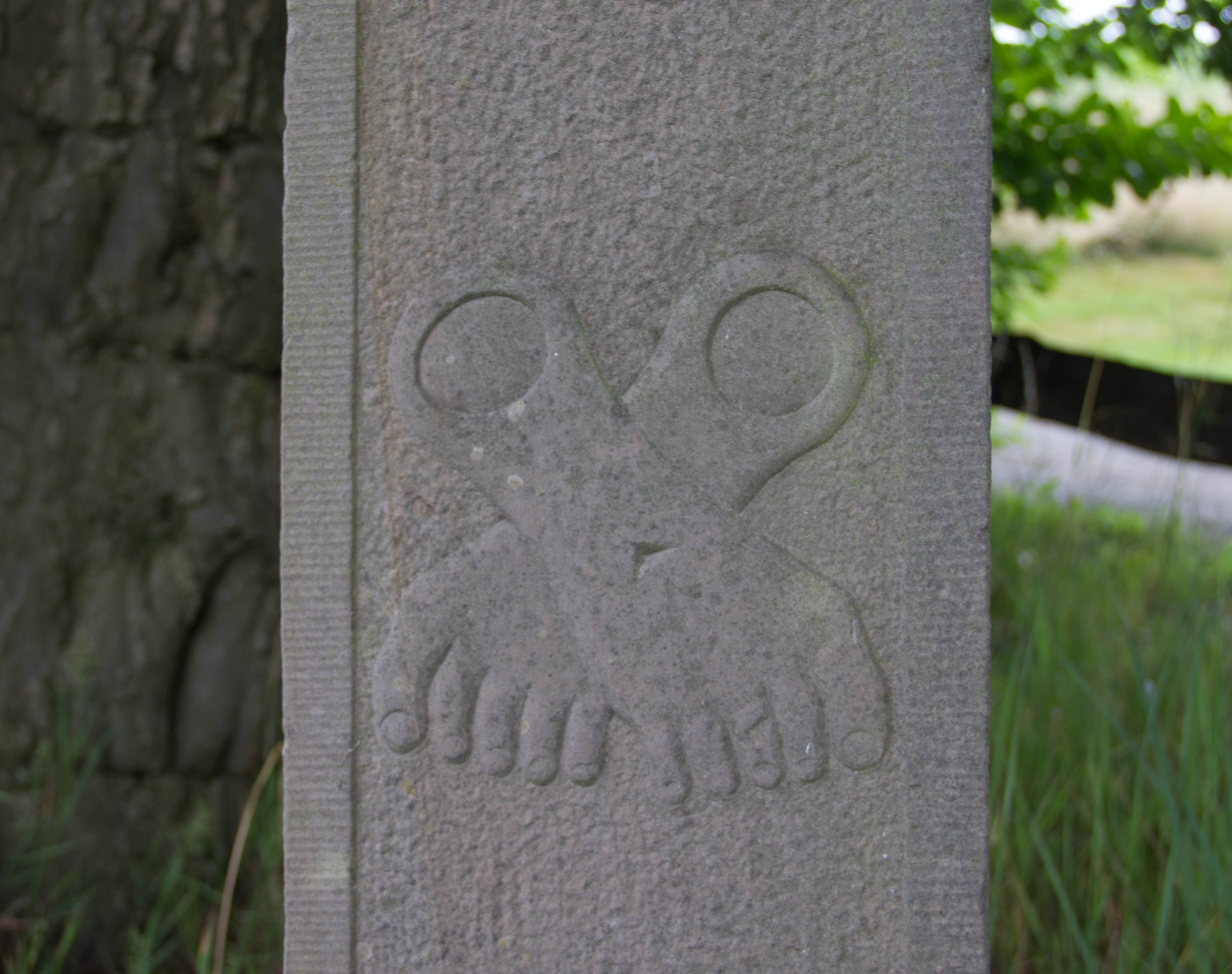 Wundmal an den Füßen am Wegekreuz Rosauel am 15. Juli 2015